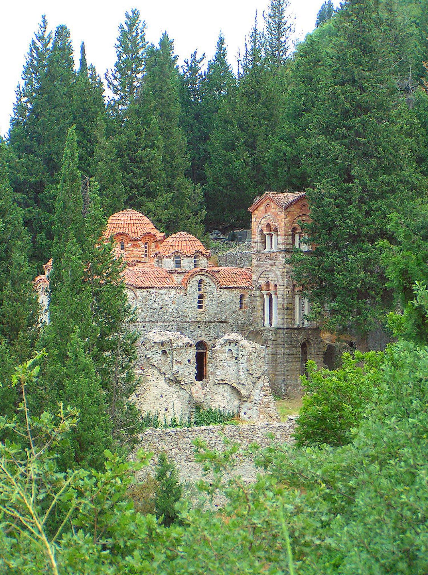 Мистра. Одигитрия.